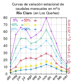 Curvas de variación estacional del río Claro (afluente del Teno). # Dirección General de Aguas # Diagnóstico y clasificación de los cursos y cuerpos de agua según objetivos de calidad. Cuenca del río Mataquito # Santiago de Chile # Ministerio de Obras Públicas (Chile) # 2004 # url: # urlarchivo: # Tabla 4.1: Río Claro en los Queñes pág. 38 mes 5 10 20 50 85 95 abr 20.439 15.327 10.875 5.787 2.869 2.017 may 55.948 36.912 22.756 10.008 4.918 3.871 jun 66.357 50.464 36.221 19.218 8.804 5.566 jul 62.908 50.467 38.448 22.343 10.615 6.326 ago 51.331 43.420 35.173 22.717 11.652 6.631 sep 55.659 45.250 35.214 21.806 12.083 8.543 oct 61.758 50.907 40.284 25.756 14.846 10.740 nov 79.755 62.962 47.726 29.193 17.516 13.788 dic 61.102 50.546 40.171 25.896 15.079 10.975 ene 43.543 33.723 25.142 15.290 9.599 7.925 feb 22.998 19.161 15.360 10.066 5.981 4.406 mar 14.619 12.276 9.936 6.632 4.031 3.009 This plot was created with Gnuplot.